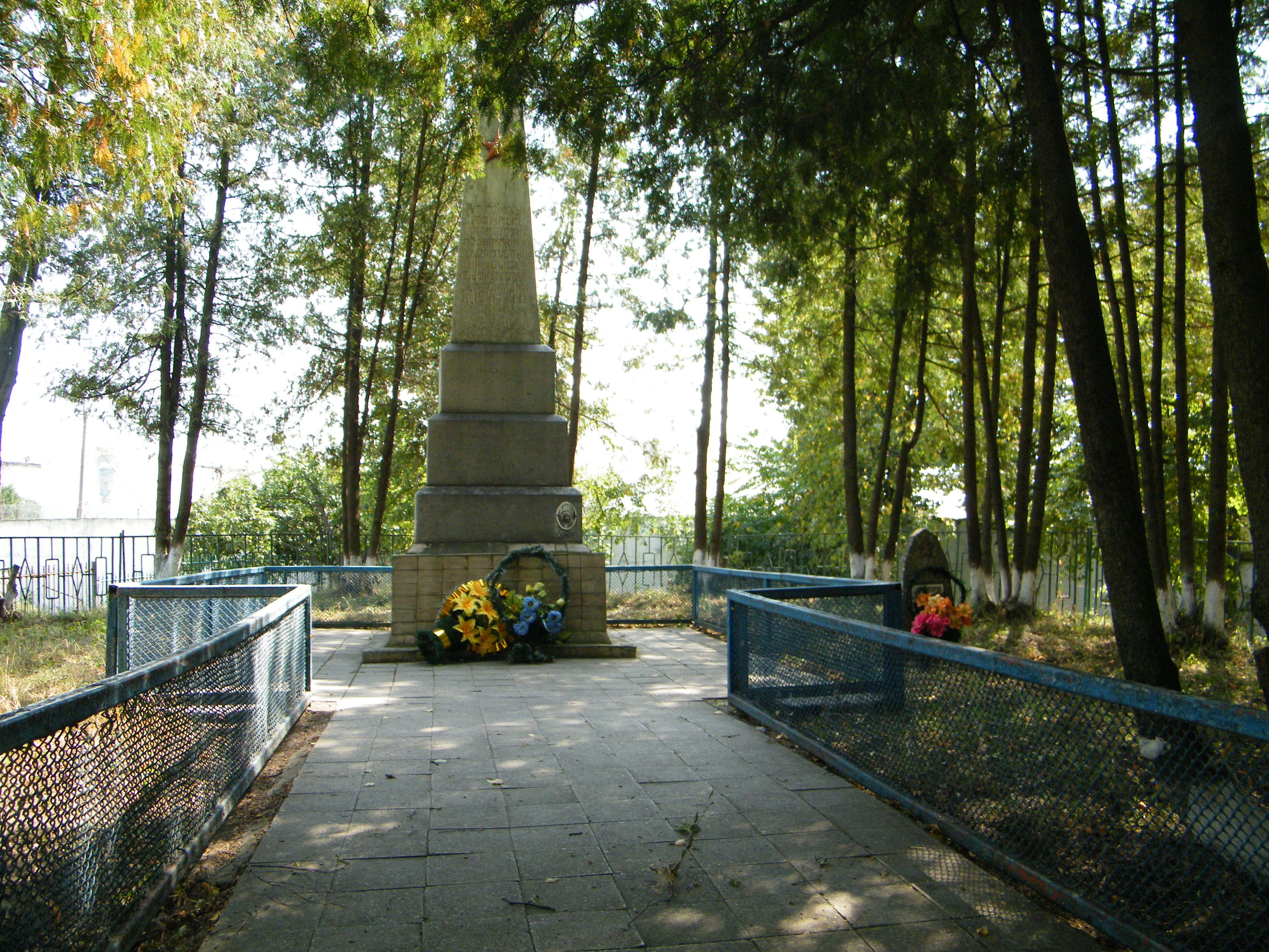 Надмогильний пам'ятник осіб страчених Гестапо по вул. Гагаріна в Ізяславі.